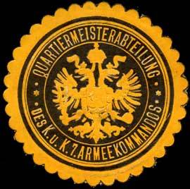 Sealing stamp Title: Quartiermeisterabteilung des K.u.K. 7. Armeekommandos Description: gelb, schwarz, geprägt Place: size: 4 cm